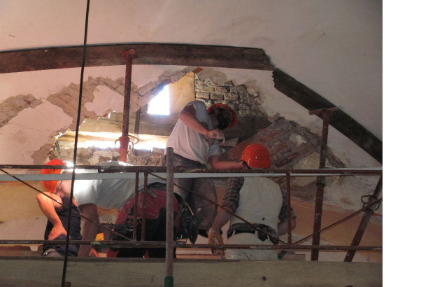 Sicherungsarbeiten an dem Dachstuhl der Mardischer Kirche. Projektleitung H. Gröbmayr